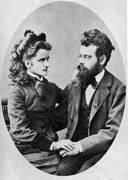 Ludwig Eduard Boltzmann (* 20. Februar 1844 in Wien; † 5. September 1906 in Duino bei Triest)